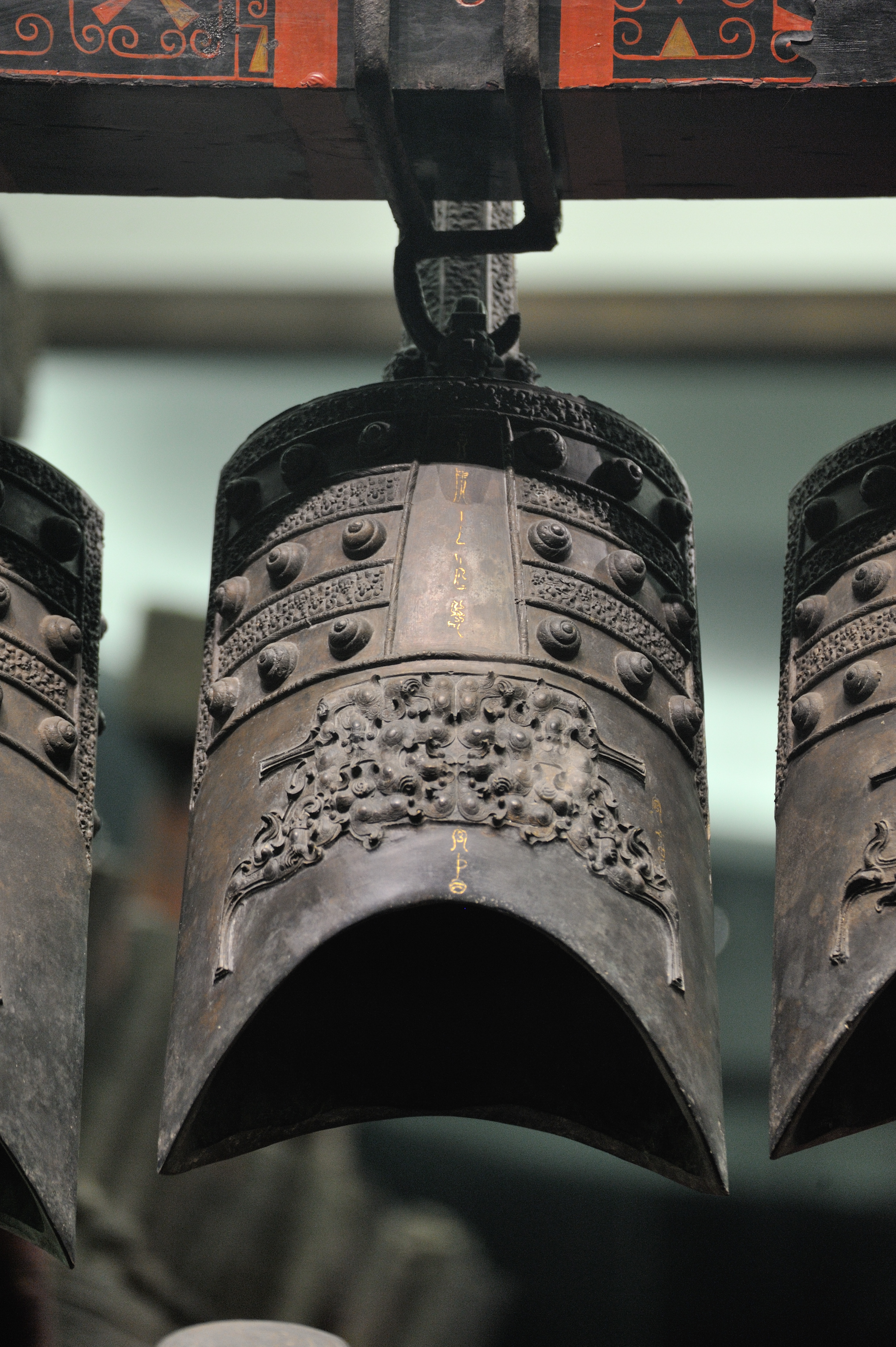 曾侯乙编钟，湖北省博物馆